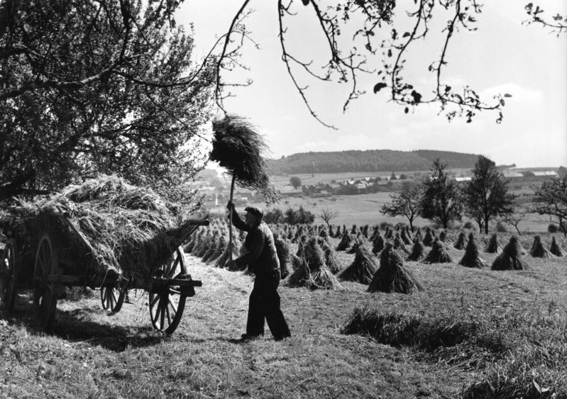 Westerwald, Aufladen von Getreide